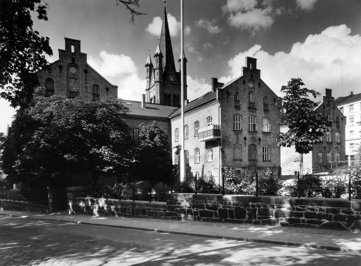 Oslo kommunale husmorskole. Skolebygningen i Borggata. Tårnet på Grønland kirke i bakgrunnen.